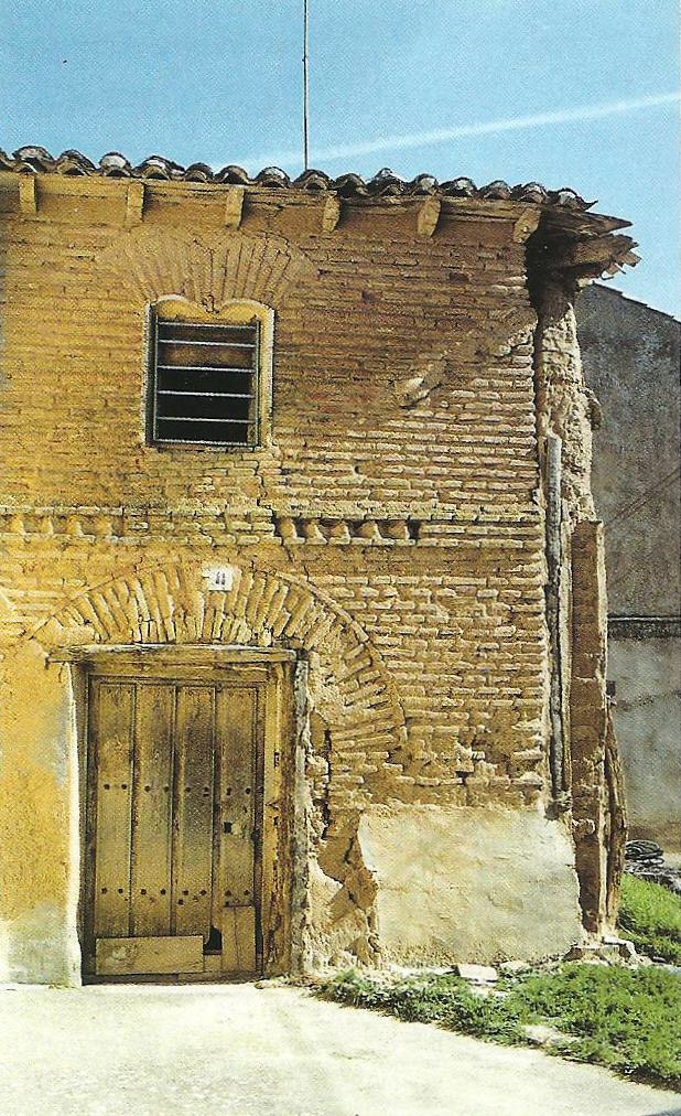 Casa de Alonso Berruguete en Villatoquite (Palencia, Castilla y León). Hasta hace pocos años en la zona norte del pueblo se conservó su fachada, junto a la cabecera de la iglesia de San Salvador. Lamentablemente resultó imposible su adecuada conservación. Morada del insigne artista del Renacimiento español, nacido hacia 1490 en la localidad de Paredes de Nava, hacia 1548 adquiere el señorío de Villatoquite (a diez kilómetros al norte de Paredes) y allí instala su casa y taller; no obstante, en 1557 se ve obligado a renunciar a este señorío, adquiriendo el de Ventosa de la Cuesta (Valladolid), en cuya iglesia habría de recibir sepultura, al pie de las gradas del altar mayor, como señor de la villa. La tradición popular atribuye a esta casa la calidad de vivienda y taller del escultor. Es pared simple de ladrillo macizo, lo que destacaba del resto de construcciones del pueblo, realizadas en adobe y tapial.